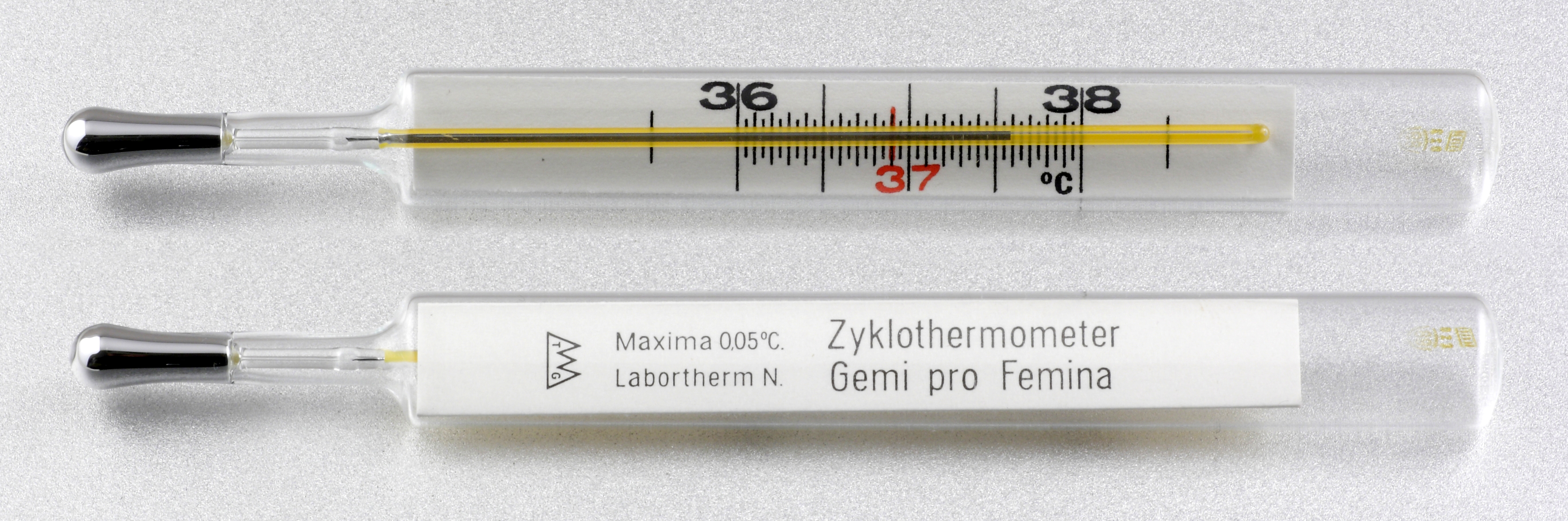 Basalthermometer mit Quecksilberfüllung (Montage aus 2 Einzelbildern)